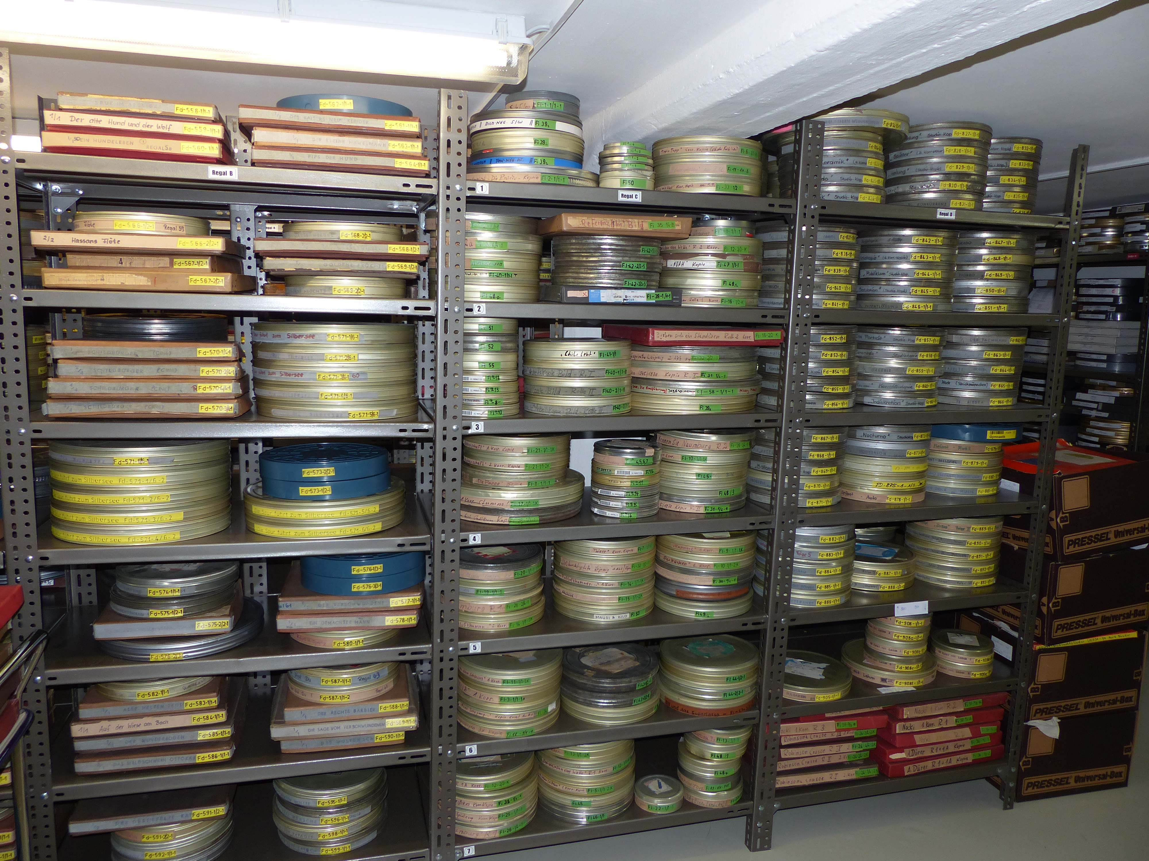 Archiv DIAF Deutsches Institut für Animationsfilm, Dresden, Sitz in den Technischen Sammlungen Dresden